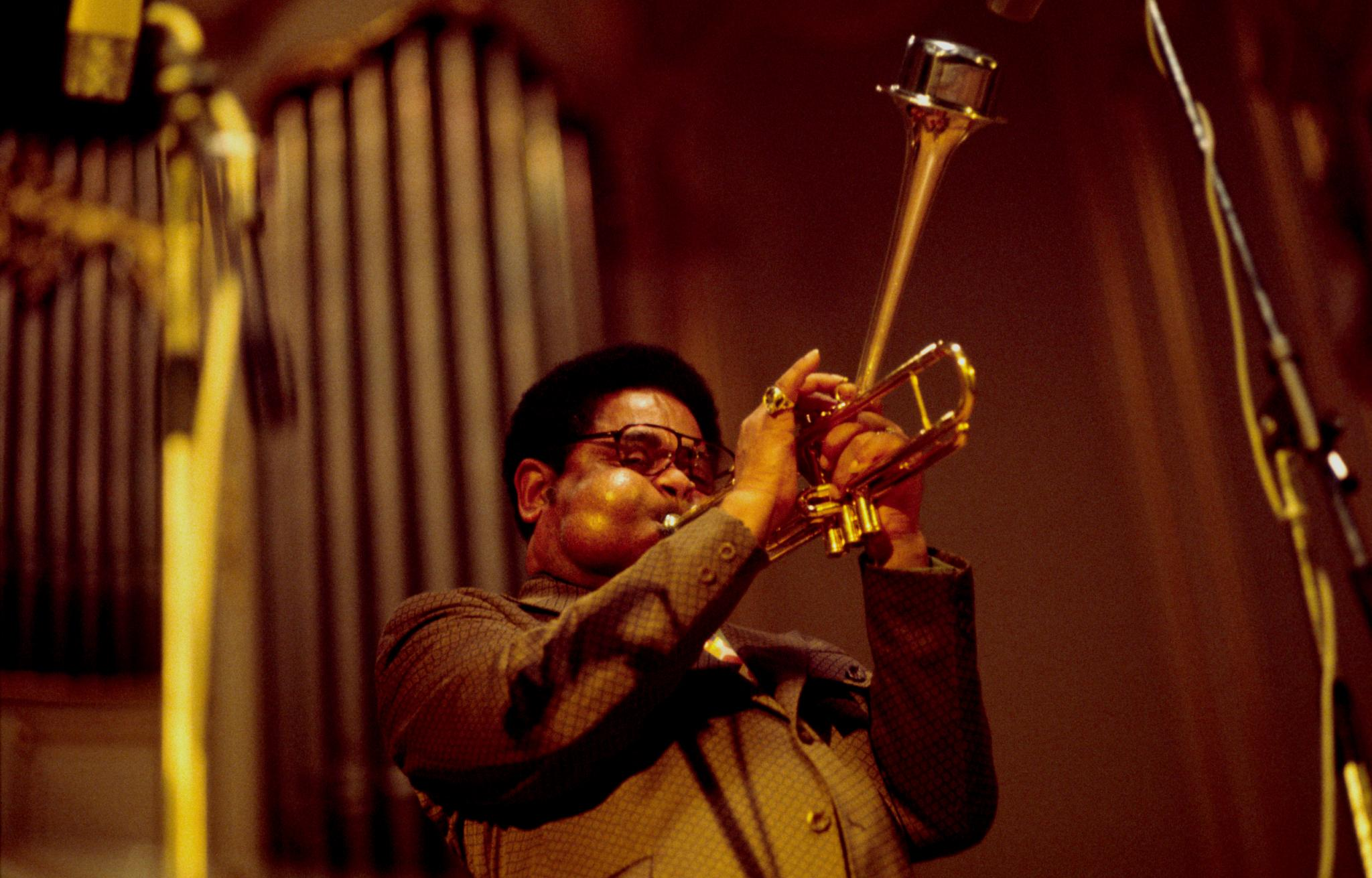 Die "Giants of Jazz" 1973 in der Musikhalle Hamburg Dizzy Gillespie in Hamburg, 1973